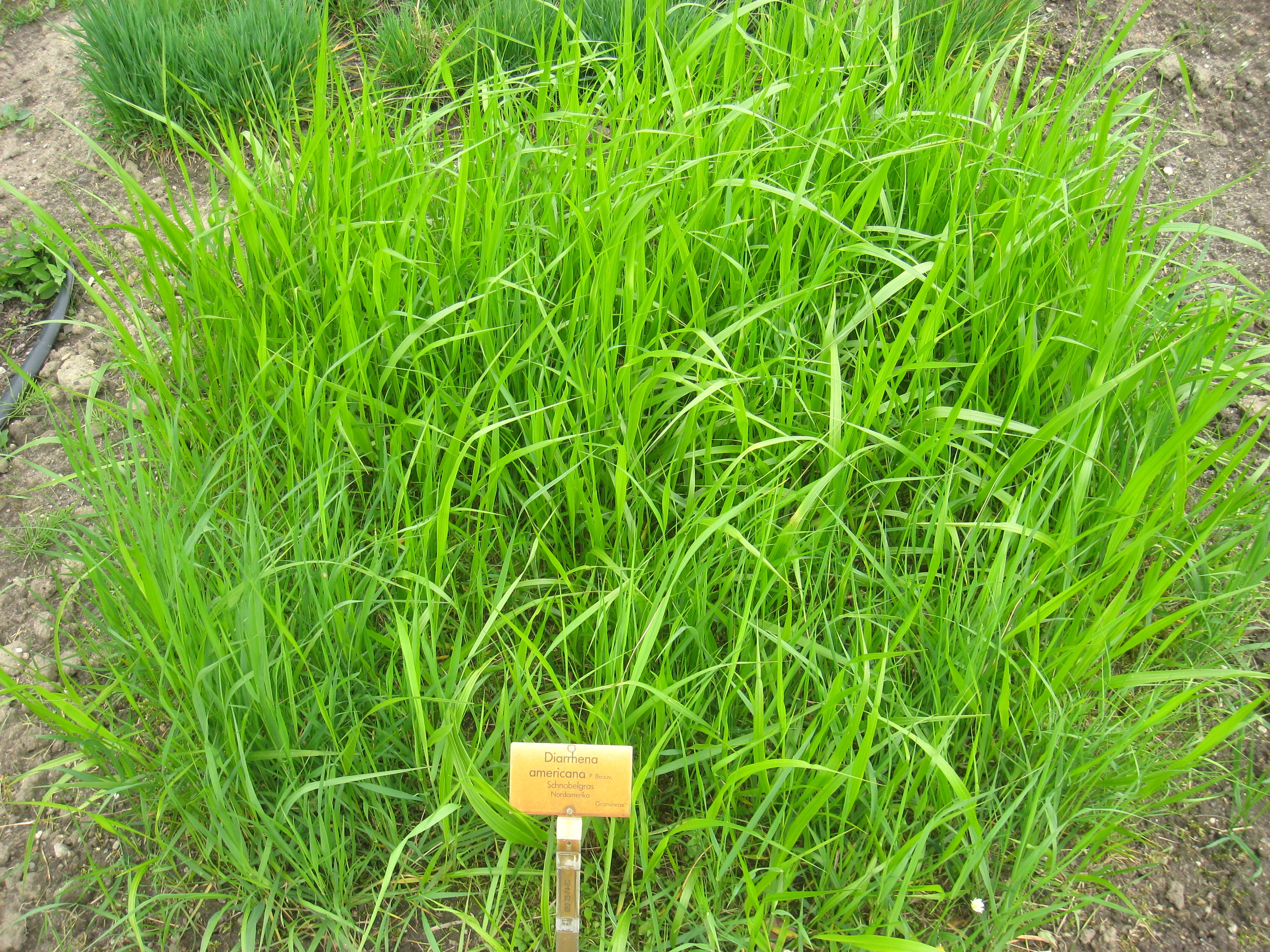 Diarrhena americana specimen in the Botanischer Garten, Berlin-Dahlem (Berlin Botanical Garden), Berlin, Germany.